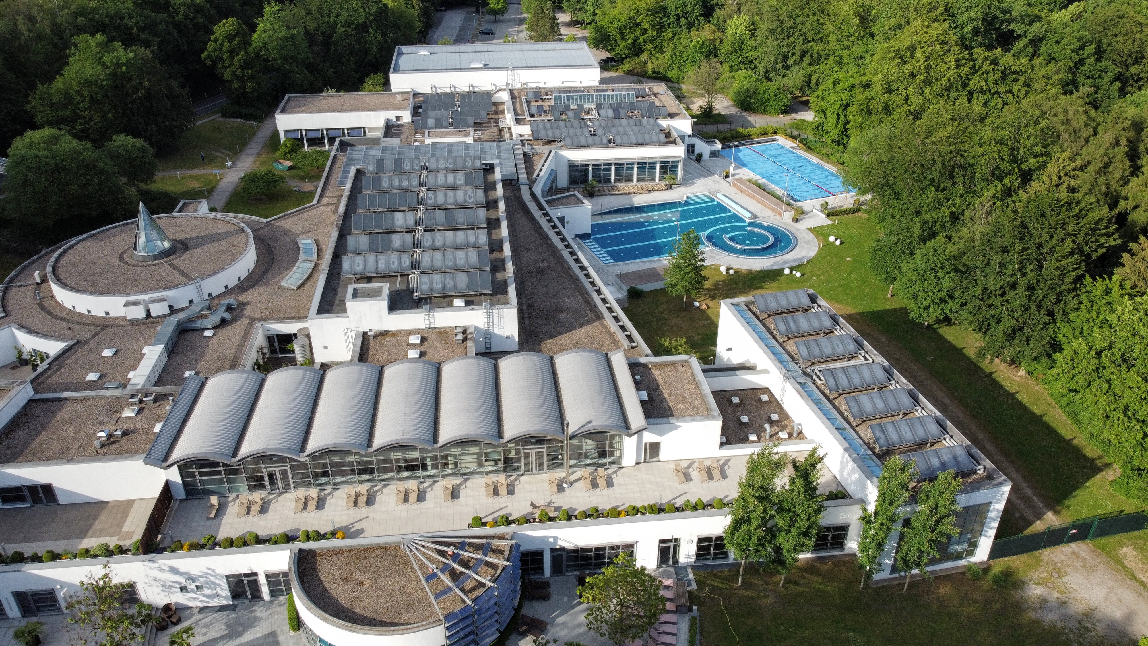 VitaSol Therme Bad Salzuflen Luftbild